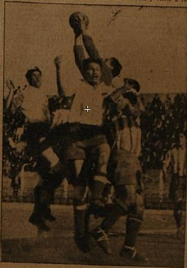 Carlos Bovo en una de sus felices intervenciones, al ejecutarce un corner